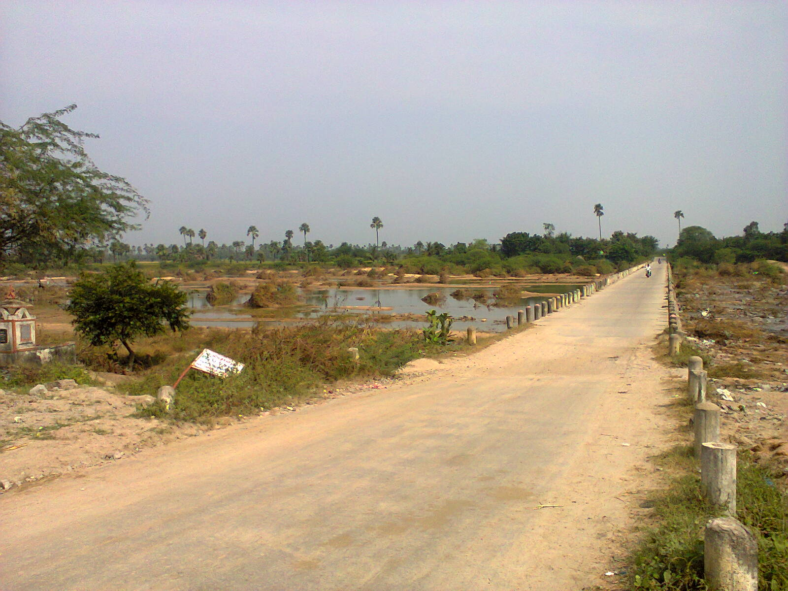 మోత్కూర్ ఏరు